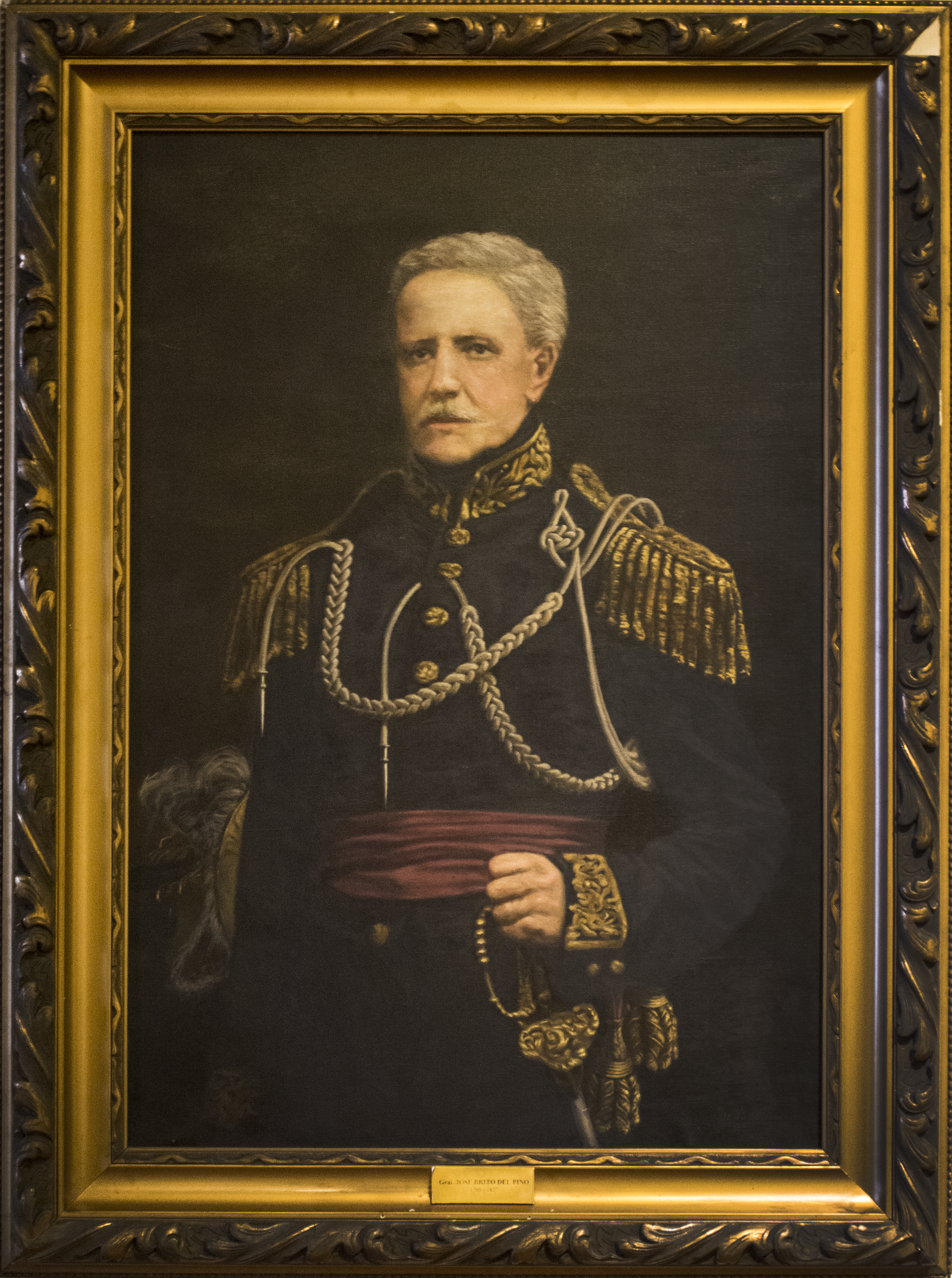 Archivo provisto por el Museo Histórico Nacional de Uruguay en el marco de un proyecto GLAM entre esa institución y Wikimedia Uruguay.